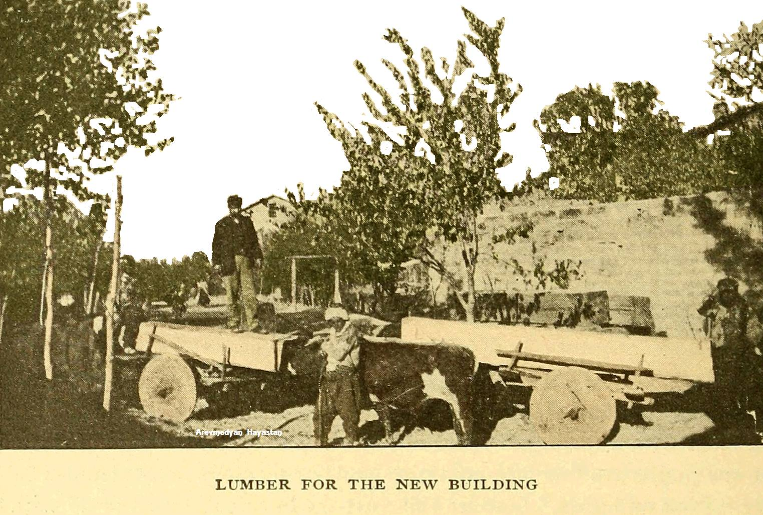 Kabaceviz'de 20. yüzyıl başında Ermeni köylüler